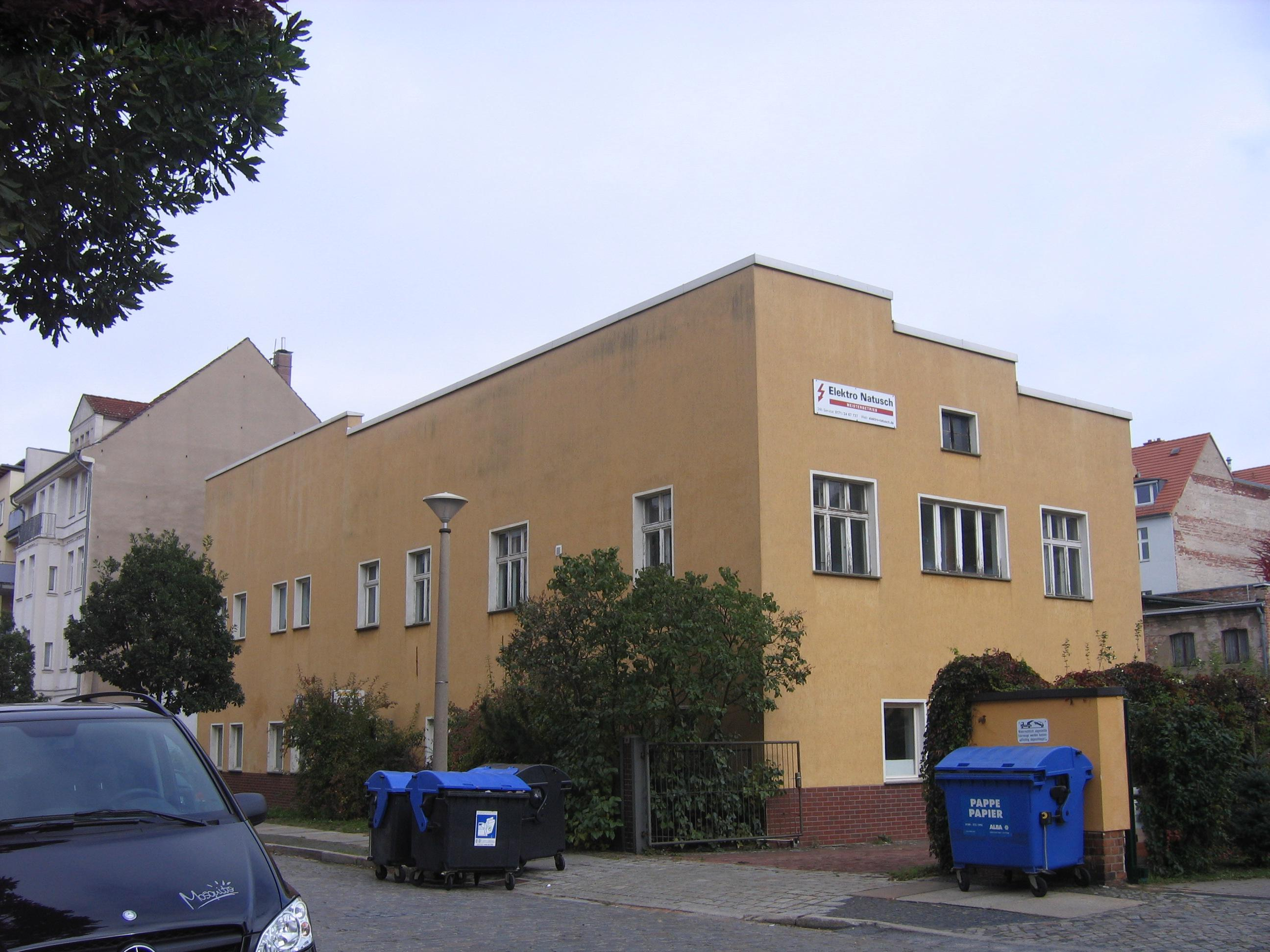 Wernerstraße 27